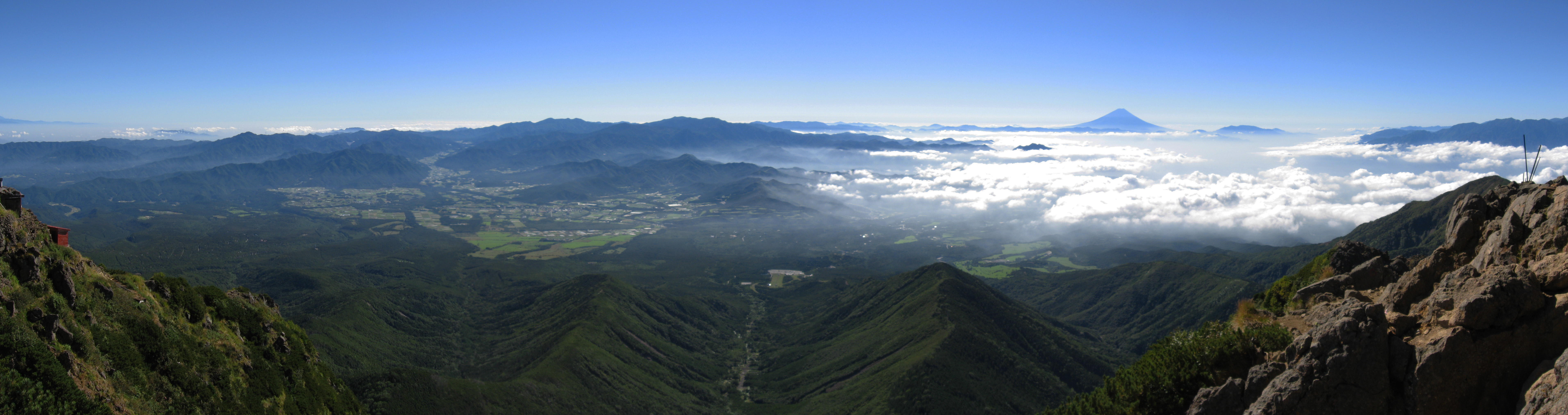 赤岳から東の眺望。